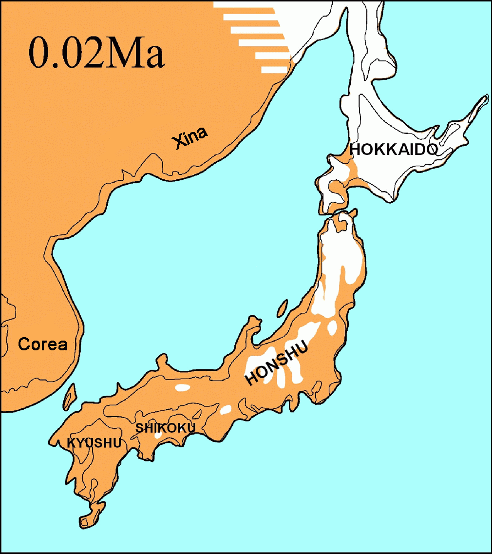 Aquesta imatge d'un mapa prehistòric del Japó